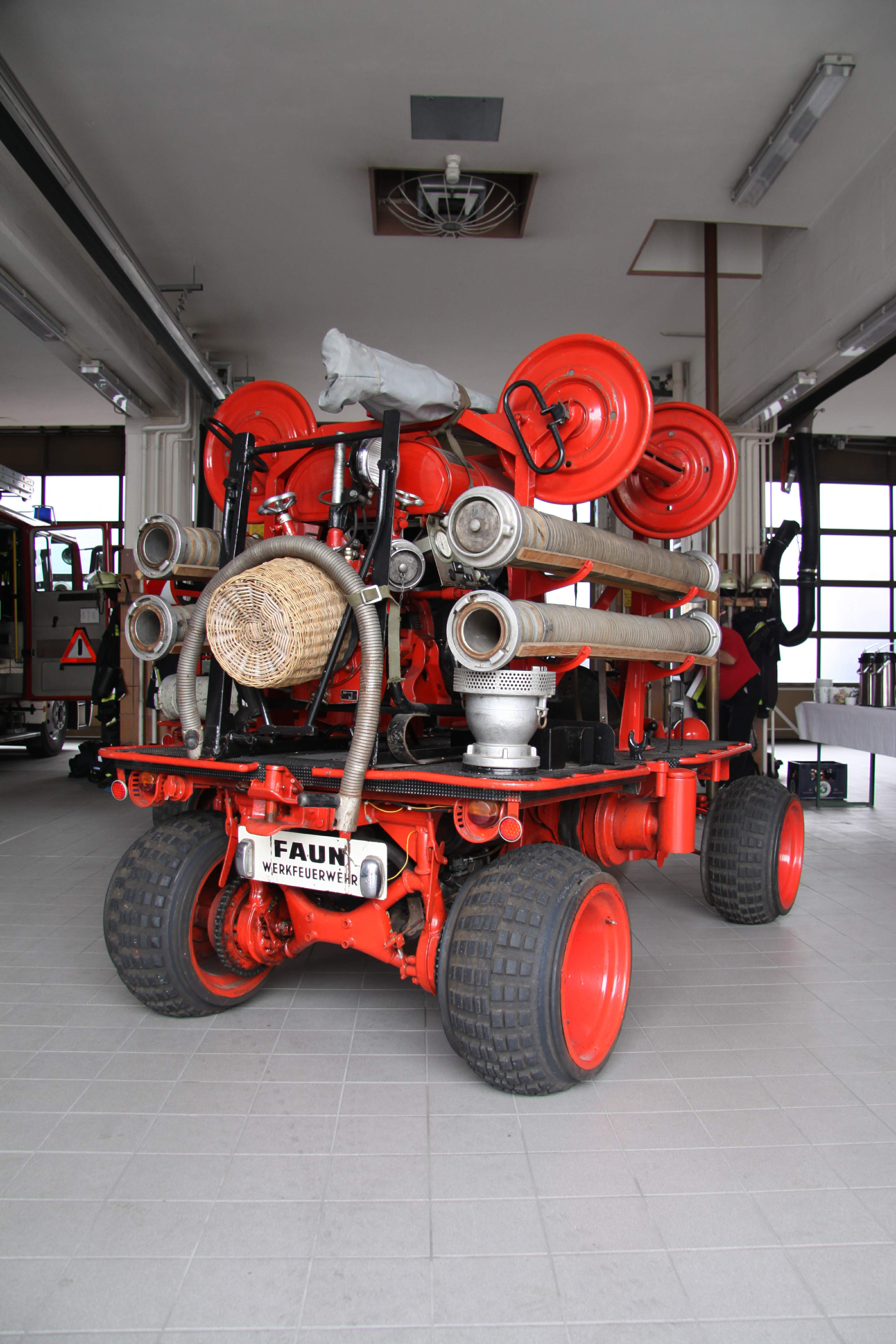 Kraftkarren (ehemals Werkfeuerwehr FAUN)